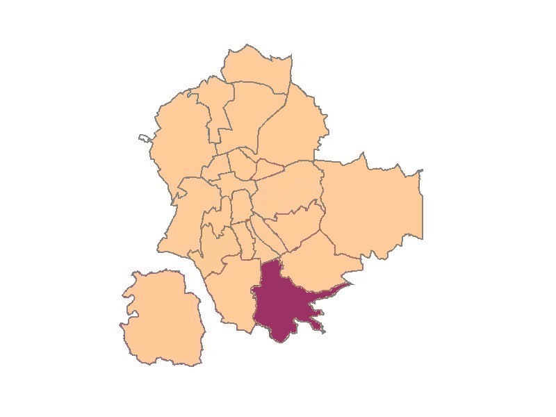 Plan de Saint-Etienne quartier de Le Bernay Valfuret La Rivière